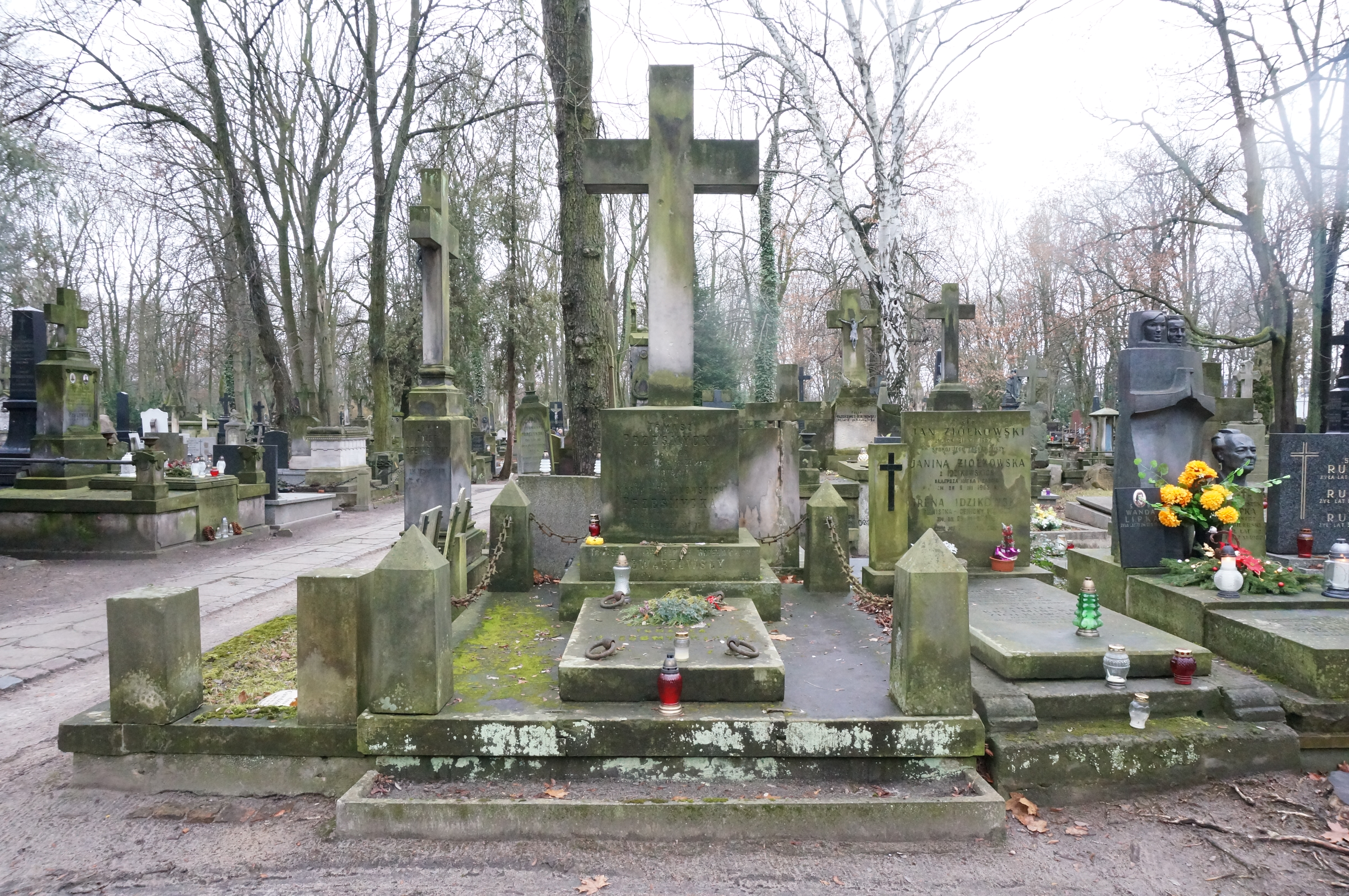 Grób Zenona Przesmyckiego na Cmentarzu Powązkowskim (kwatera 46, rząd 1, grób 29, 30)